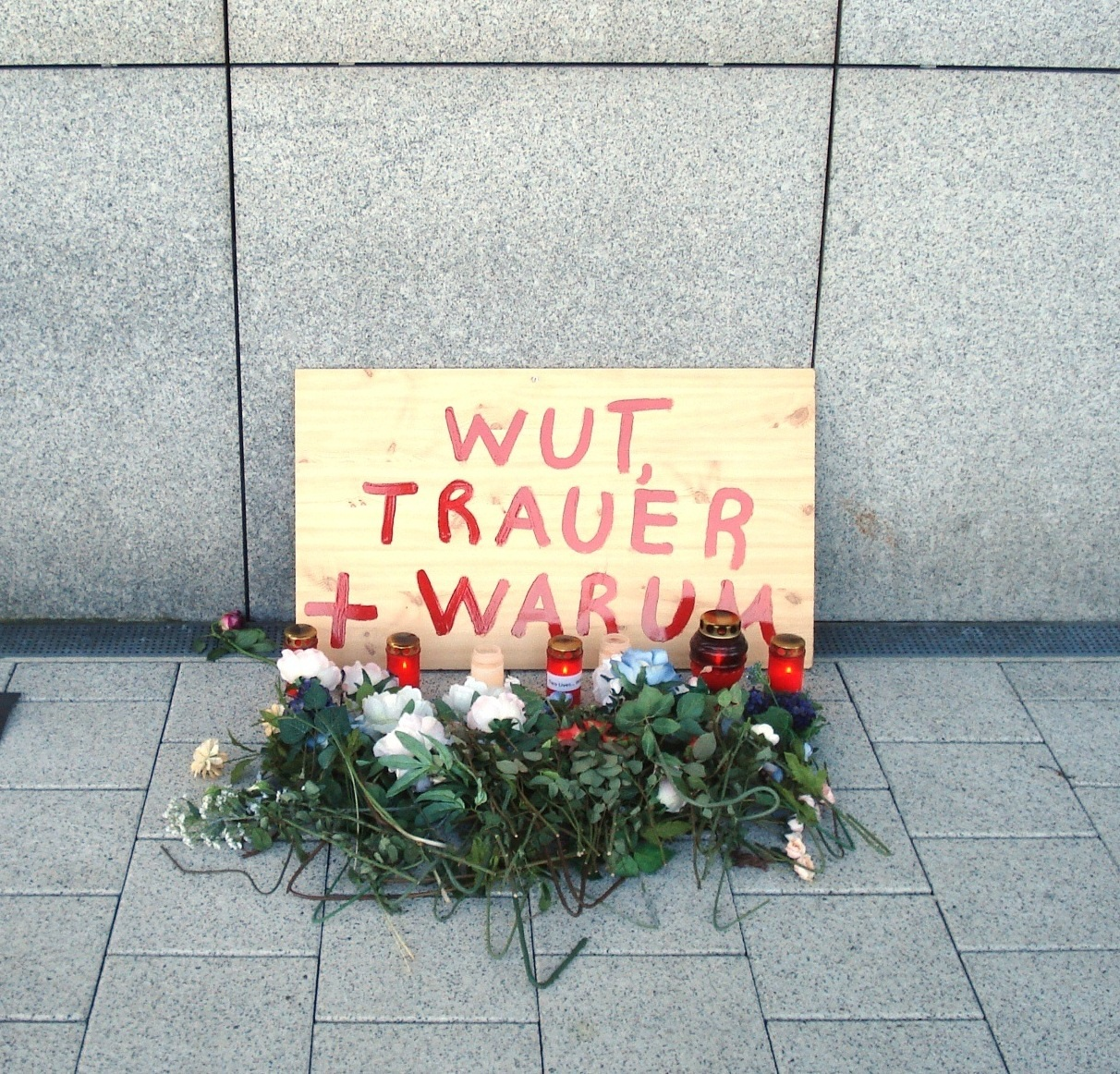 Flughafen FFM - Gedenken an Anschlag vom 02.03.2011